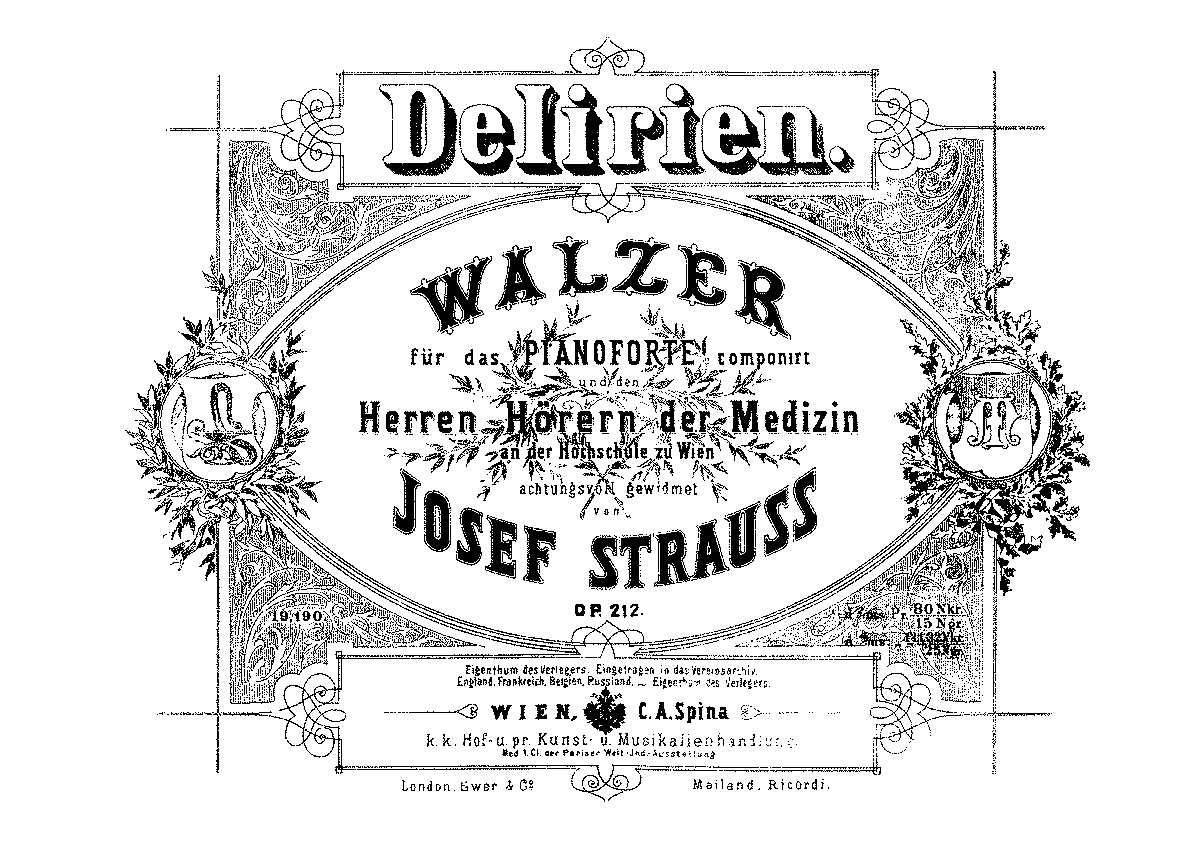 ヨーゼフ・シュトラウスのワルツ『うわごと』のピアノ譜表紙。